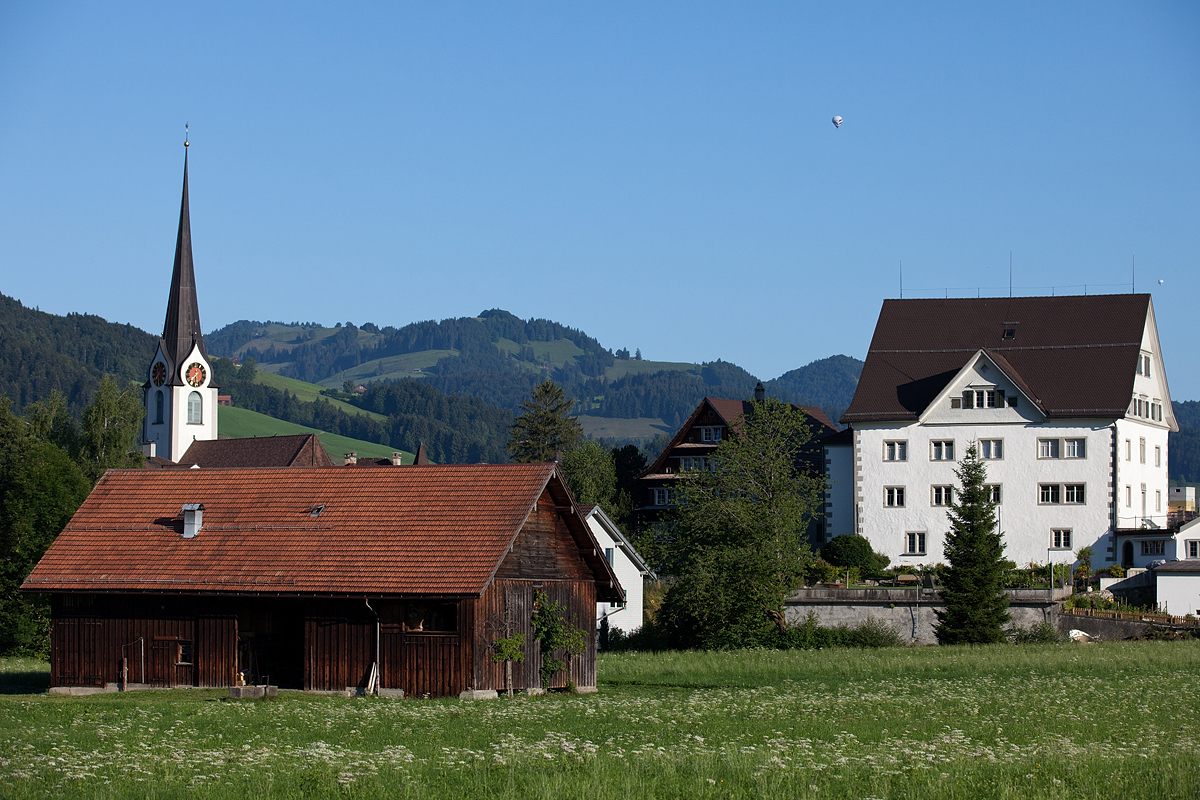 Reformierte Kirche und Haus Steinfels in Ebnat-Kappel